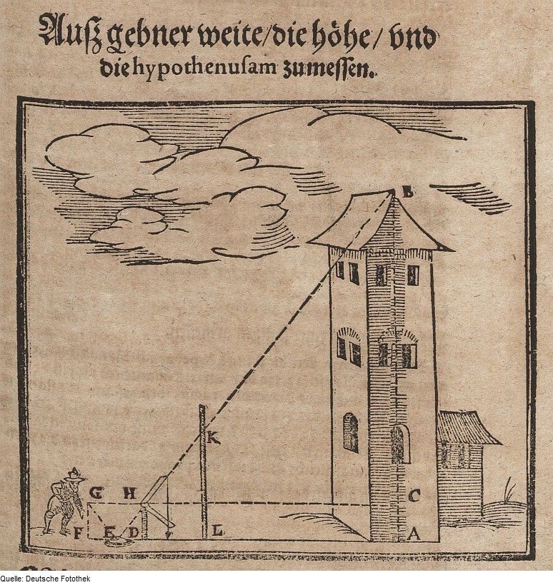 Original image description from the Deutsche Fotothek Geometrie & Vermessung & Höhe & Messinstrument & Turm